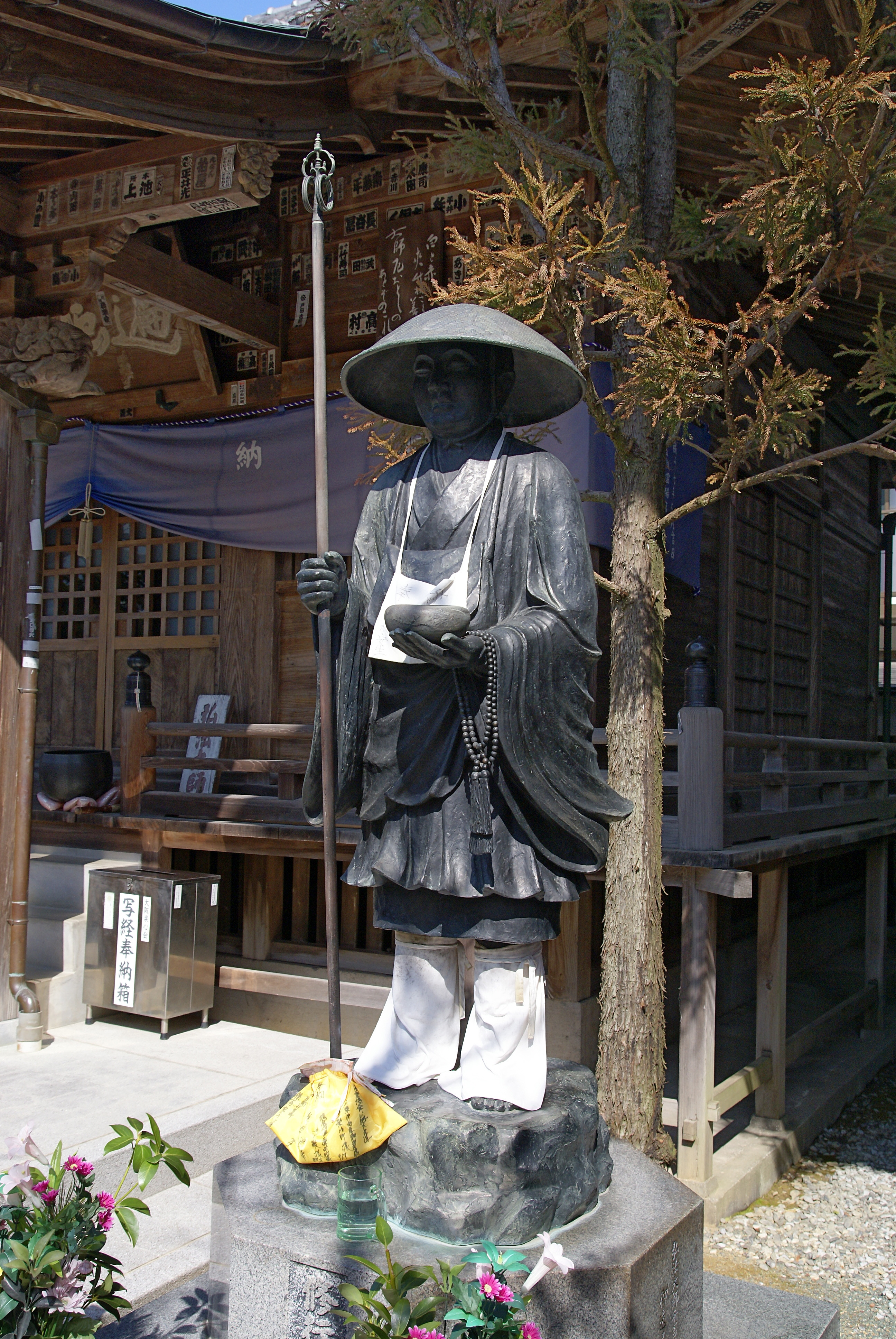 Zenrakuji in Kochi, Kochi prefecture, Japan